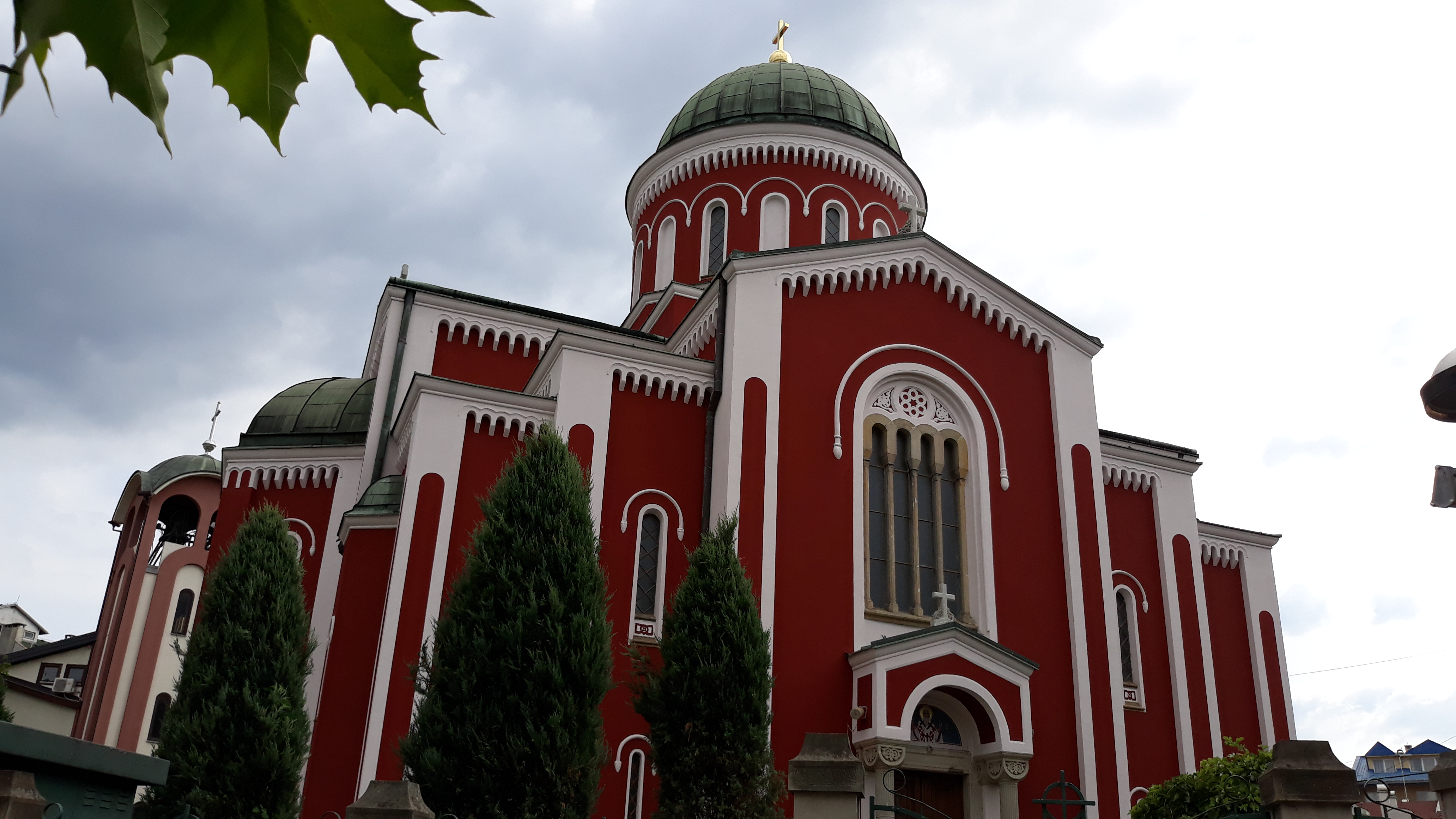 Саборна црква у Крушевцу